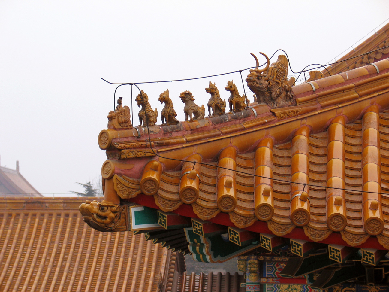 Cité interdite : Détail toiture / Forbidden City : Roof detail